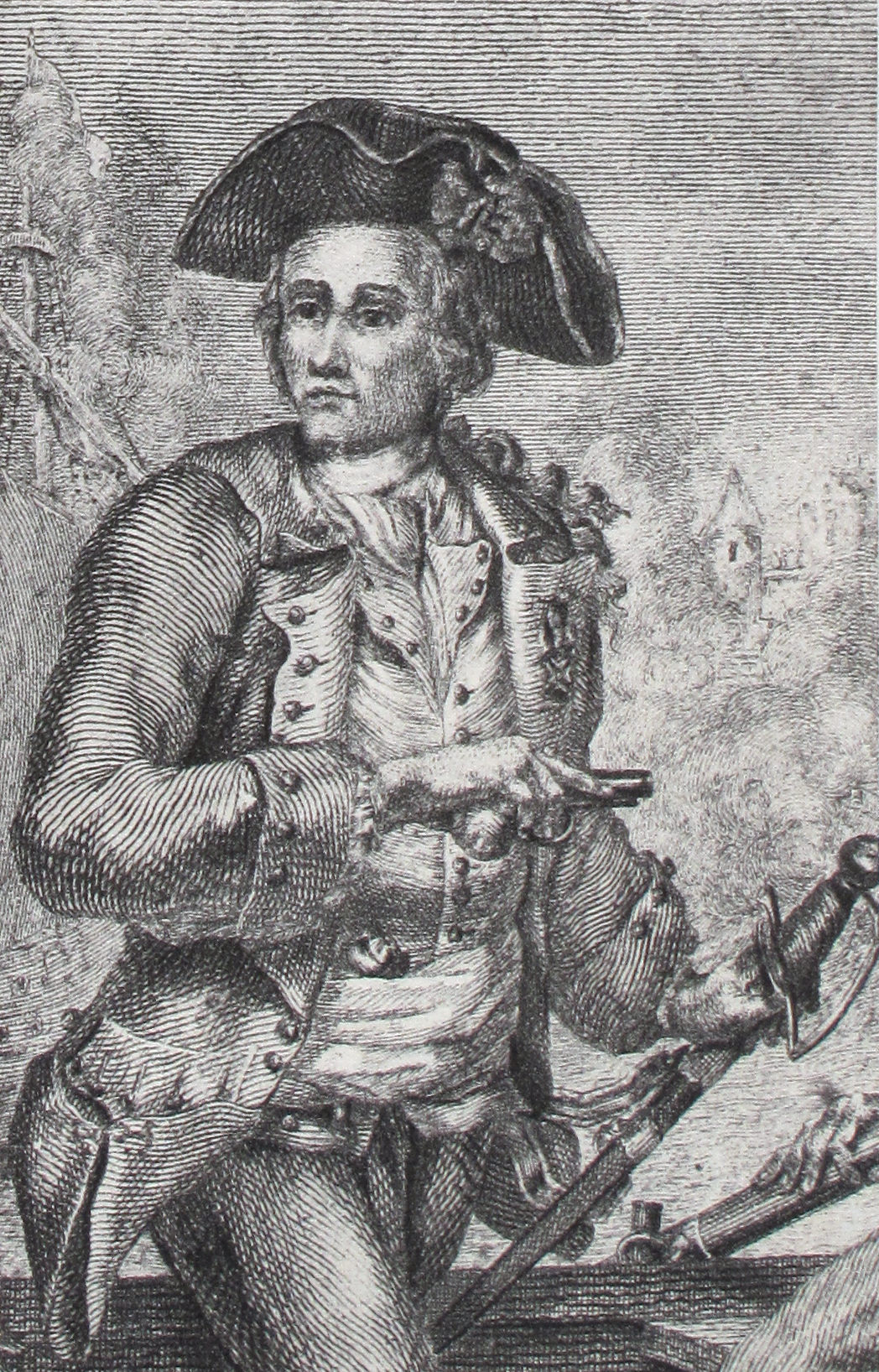 Portrait of Jacques Cassard